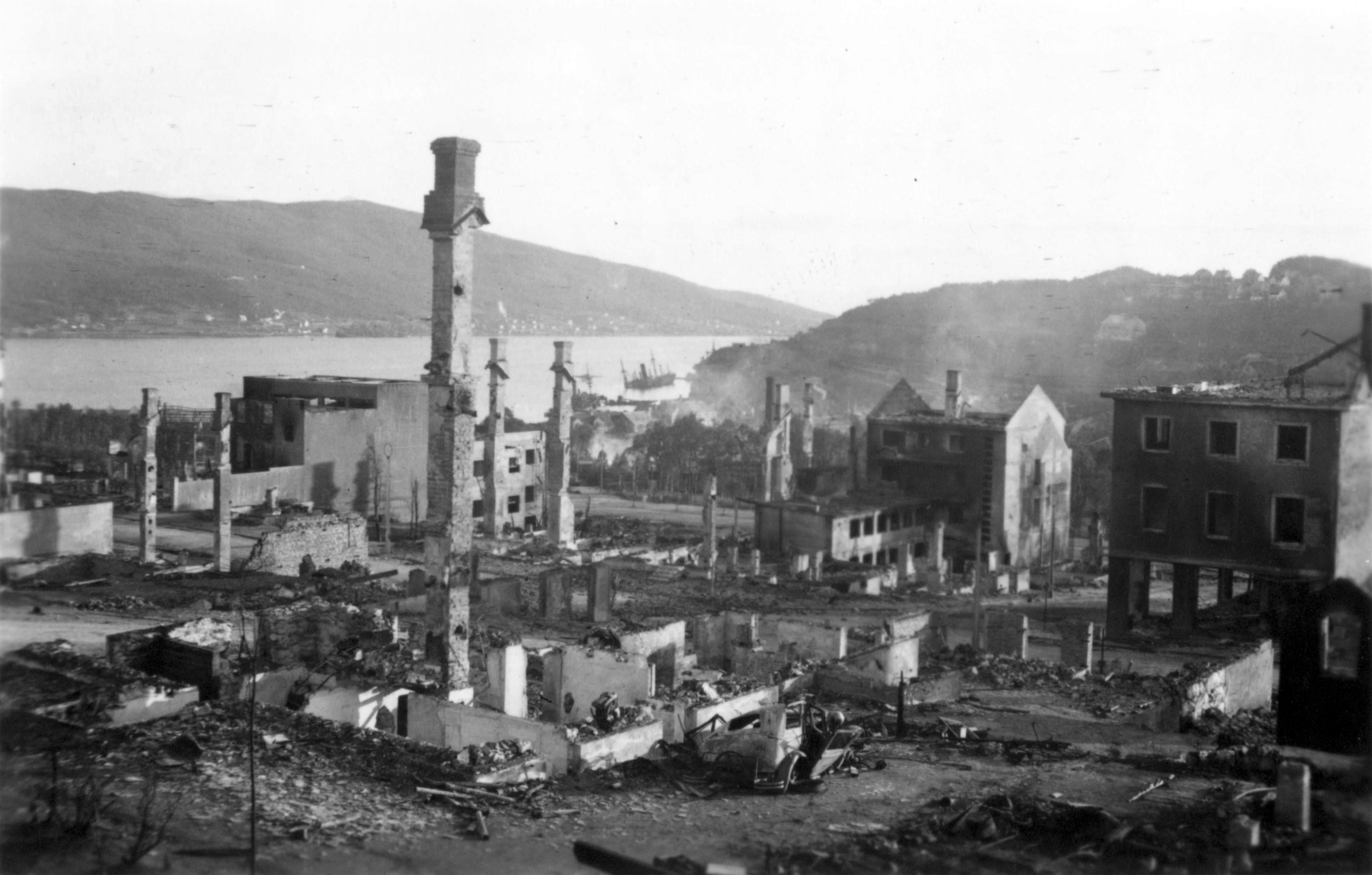 Etter kampene i Narvik - Sentrum, Ankenes i bakgrunnen? Tittel / Title: Narvik slik det så ut da Büffelsoldatene kom 13 juni 1940 Dato / Date: 13.06.1940 Fotograf / Photographer: Ukjent/Unknown Sted / Place: Narvik, Nordland, Norge Eier / Owner Institution: Arkiv i Nordland Lenke / Link: Arkiv i Nordland Arkivreferanse /Archive reference: AIN.NA143.0021 Fra Dag Skogheims Privatarkiv Tekst bak på bildet: 13.06.1940: Das leidgeprüfte Narvik nach dem abzug der alliierten truppen.